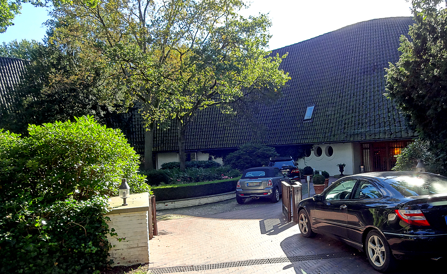 Wikingborg, Haus Parchmann in Bremen, Katrepeler Landstraße 51Das abgebildete Objekt ist ein geschütztes Kulturdenkmal in der Freien Hansestadt Bremen, mit der Nr. 0646 beim Landesamt für Denkmalpflege registriert.